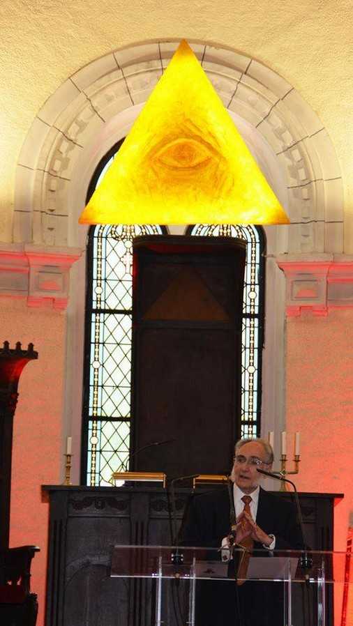 GLDF, Paris, 2016 рік, жовтень, вшанування пам"яті Папюса на 100 роковини з дня смерті.